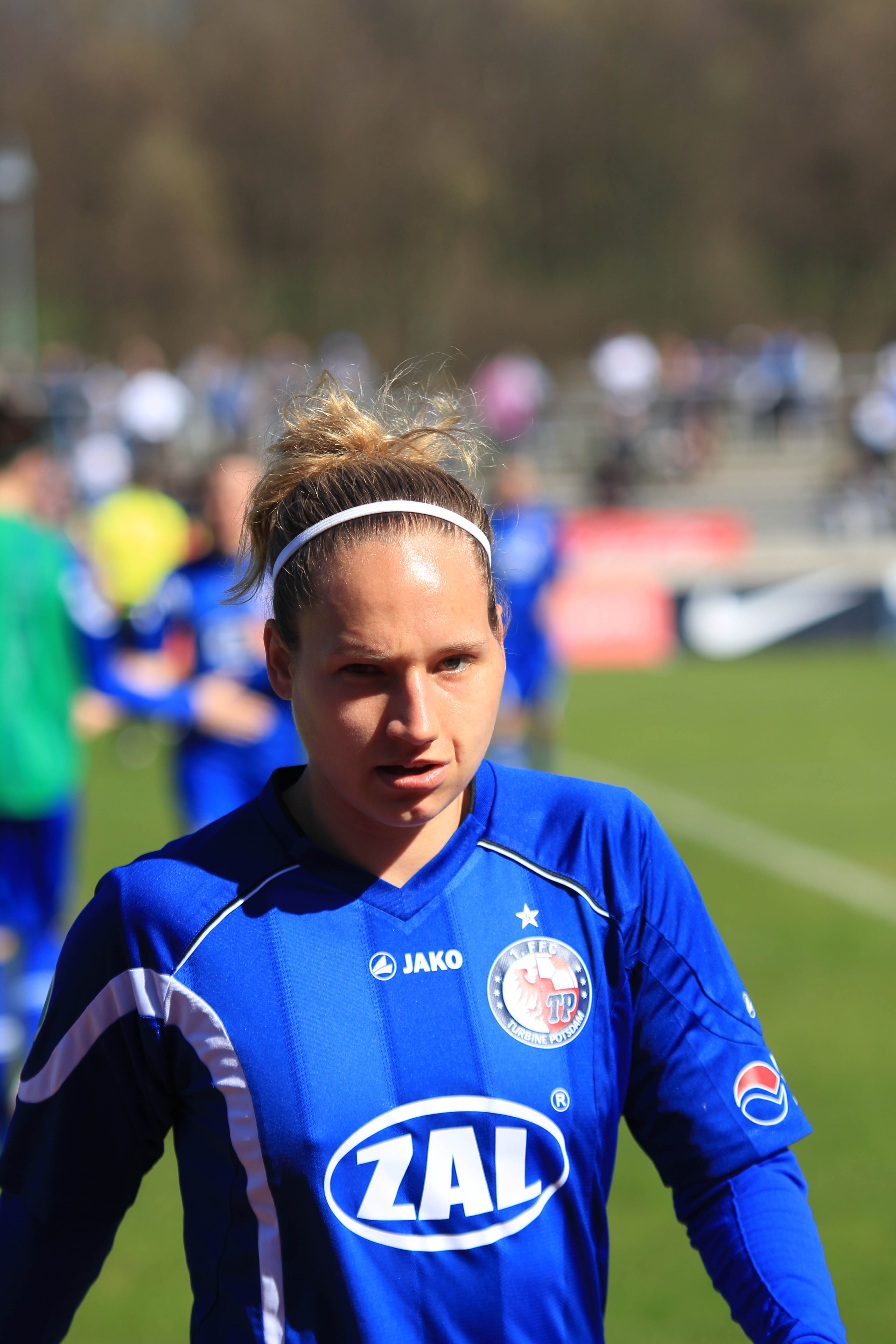 German footballer Babett Peter, Turbine Potsdam